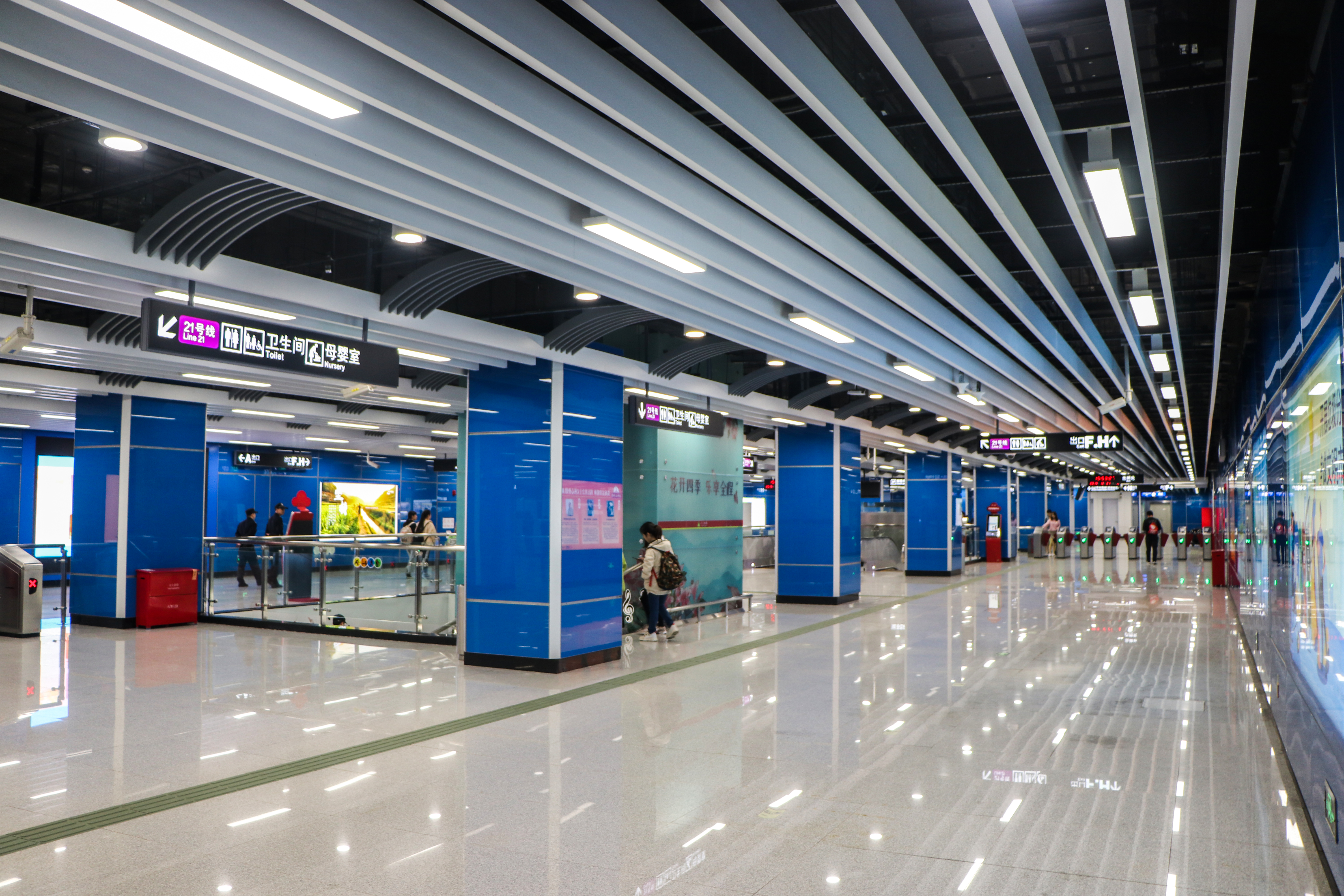 广州地铁黄村站